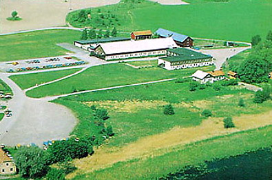 Flygfoto över Skoklosters bil och motormuseum